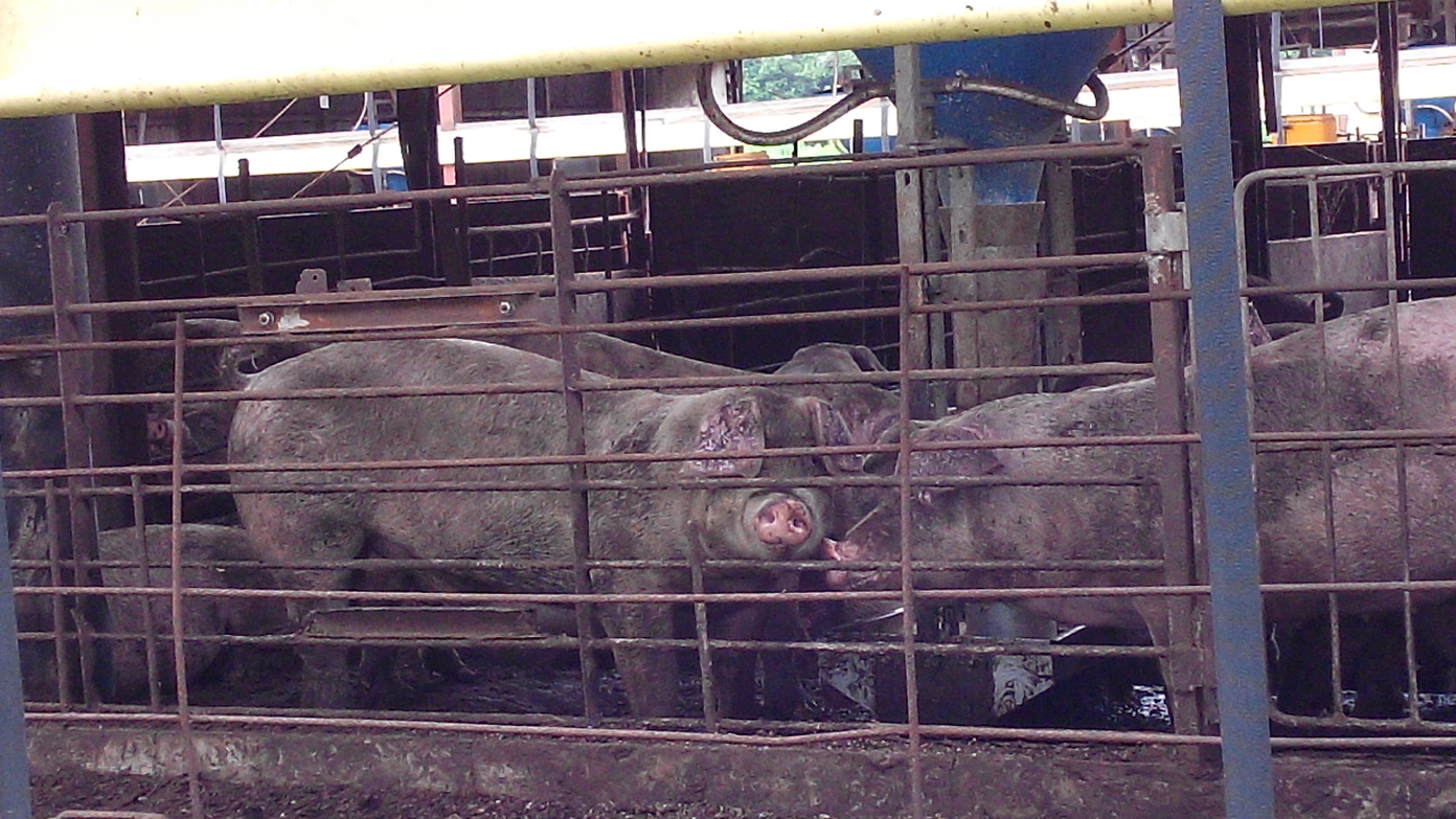 肥育される豚 生後半年ほどで出荷される